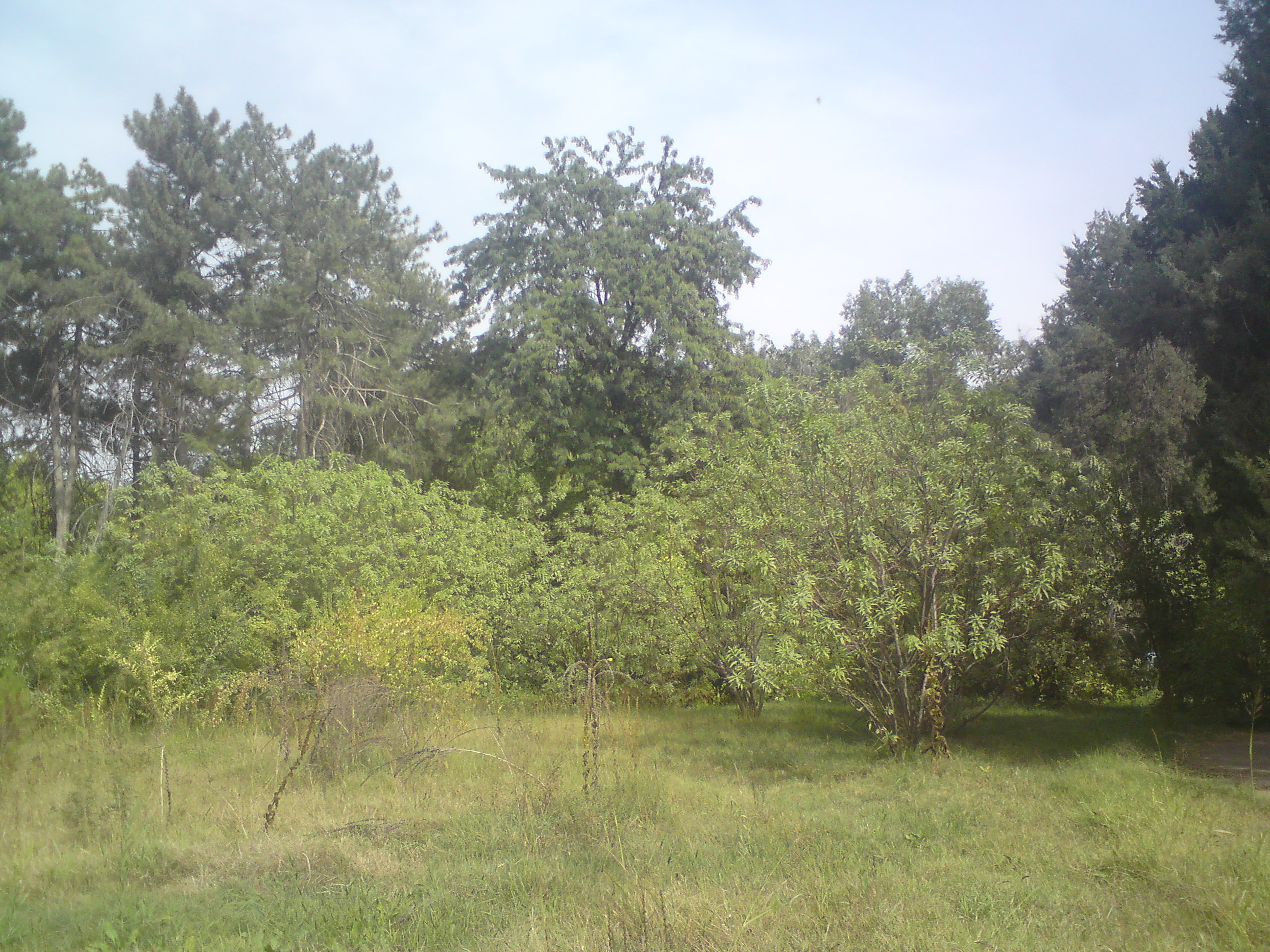 Ботанический сад Ташкента, европейская коллекция, на заднем плане - сосны